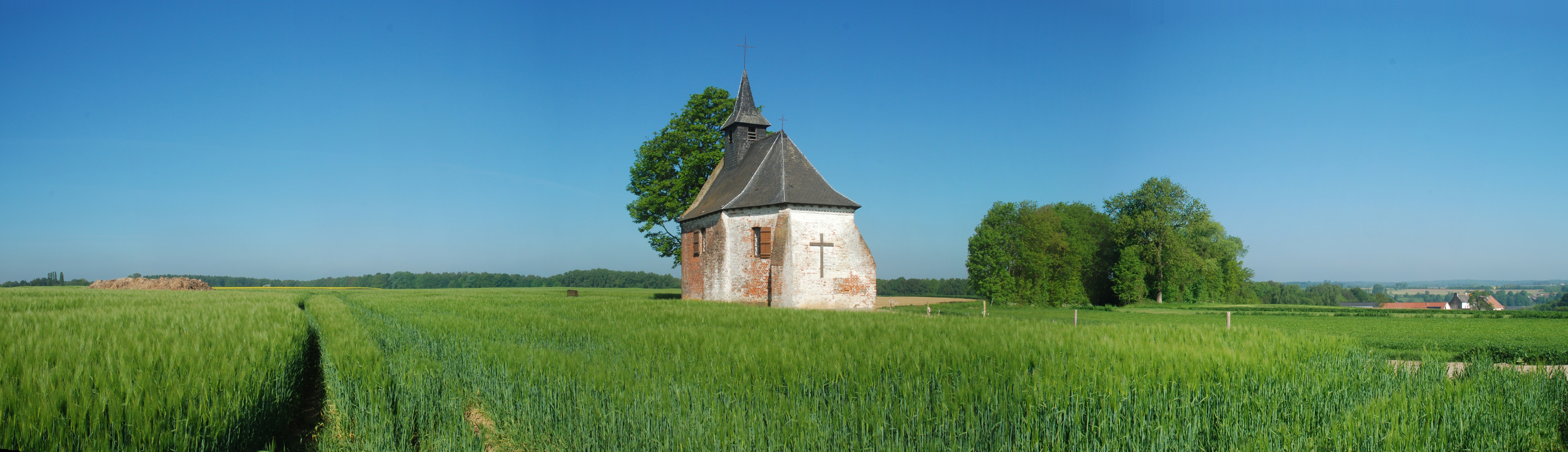 Belgique - Bousval - Chapelle du Try-au-Chêne